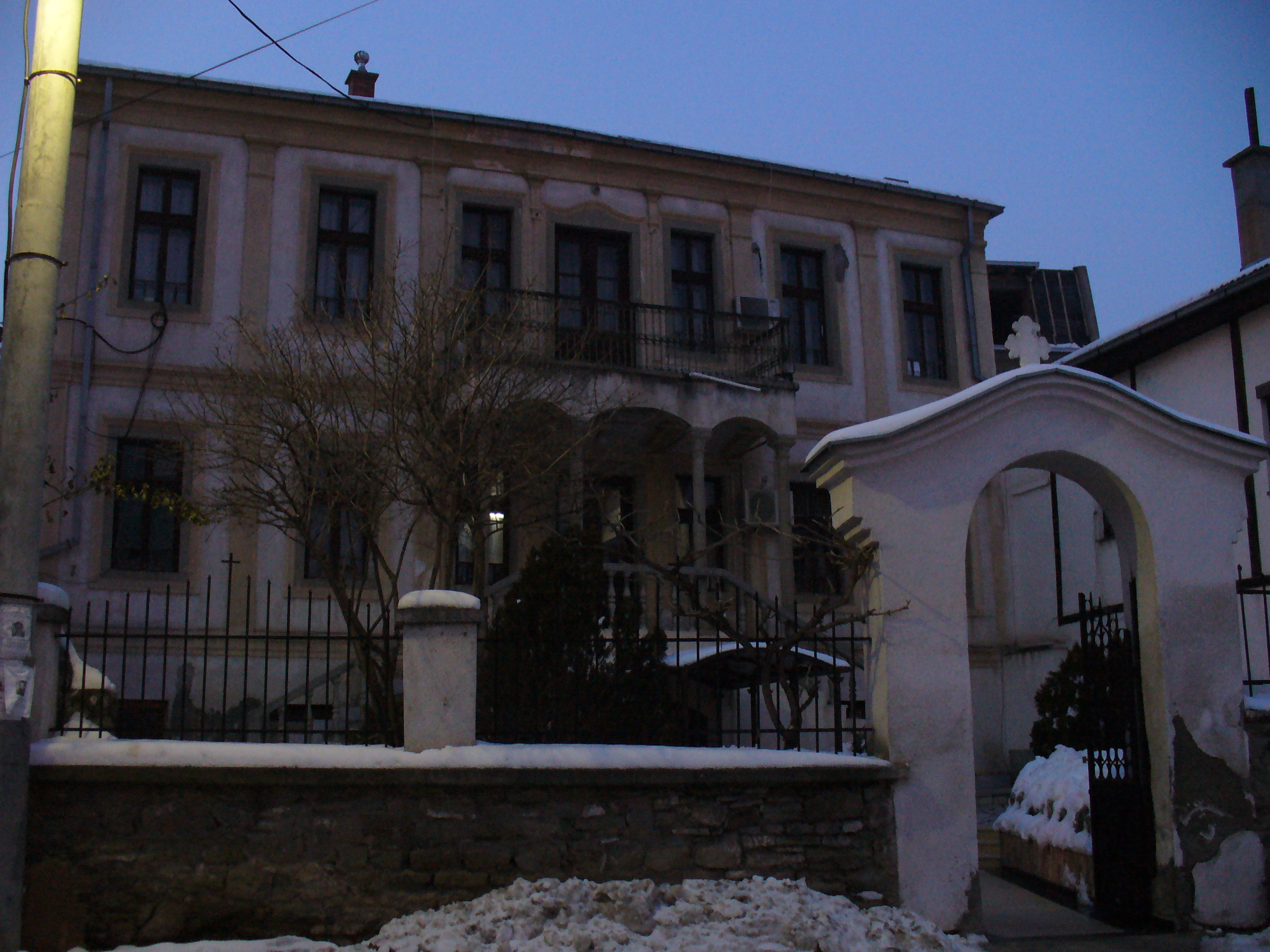 Стара къща в Щип, Република Македония.